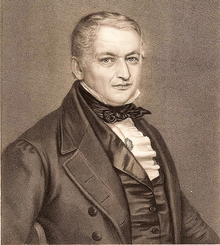 Porträt des Politikers Johann Jakob Wieland, nach dem Leben von Conrad Hitz ; Lith. von Karl Friedrich Irminger, um 1850 (Ausschnitt). Lithografie ; 20,1 x 16,4 cm. Zentralbibliothek Zürich, Wieland I, 1 (II).